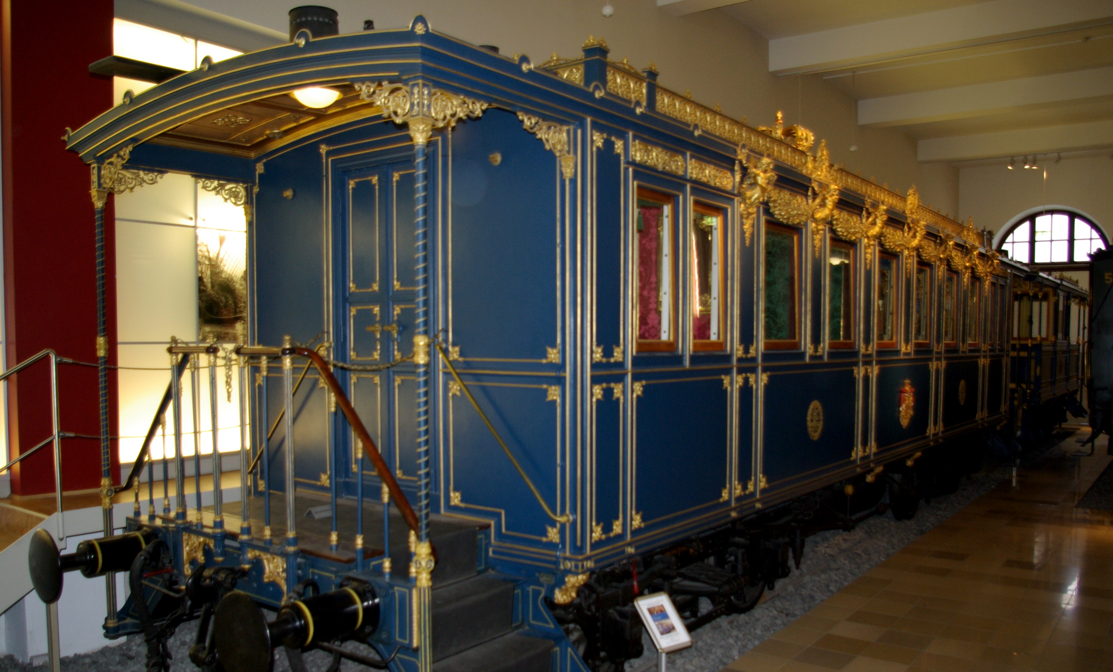 Bayerischer Hofzug von Ludwig II. im DB Museum Nürnberg